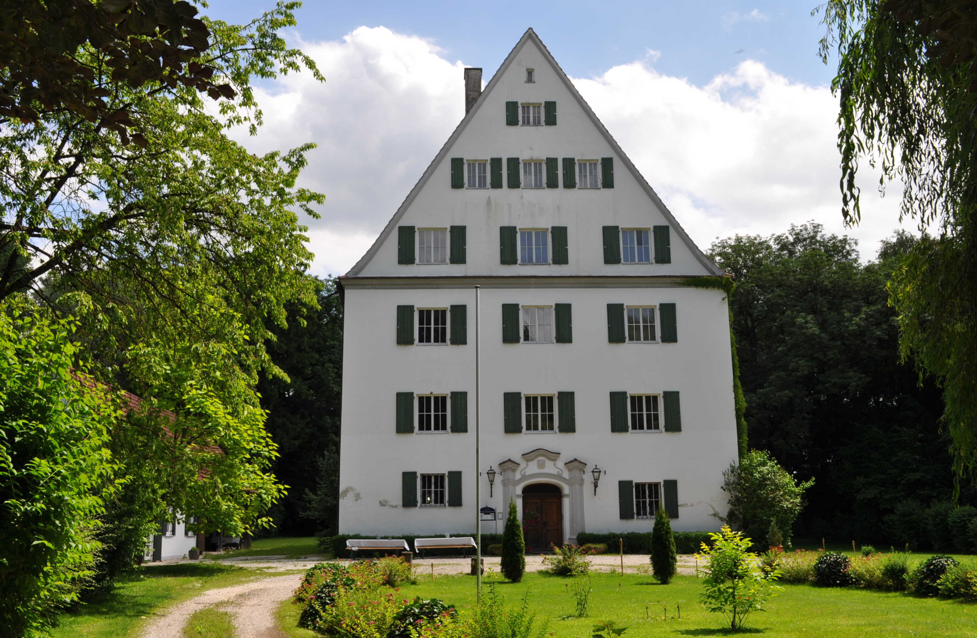 Schloss der Freiherren von Freyberg in Unterknöringen einem Stadtteil von Burgau im Landkreis Günzburg (Bayern)